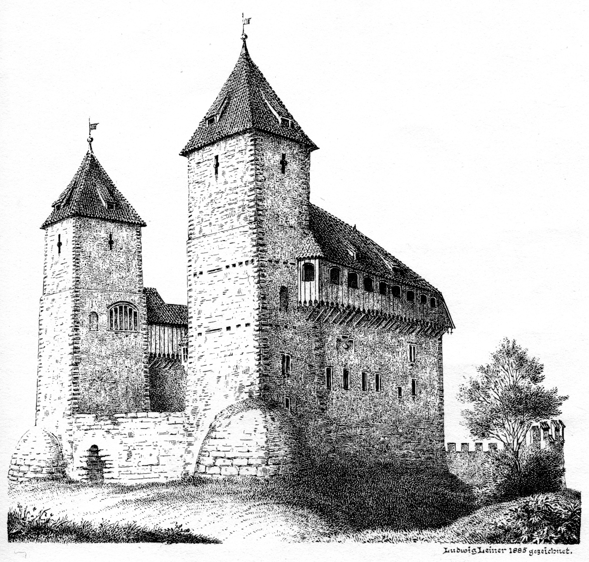 Ludwig Leiner (1830-1901): Schloss Gottlieben, Kanton Thurgau